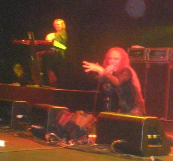 Foto de Dio se apresentando no Rio de Janeiro, 2006